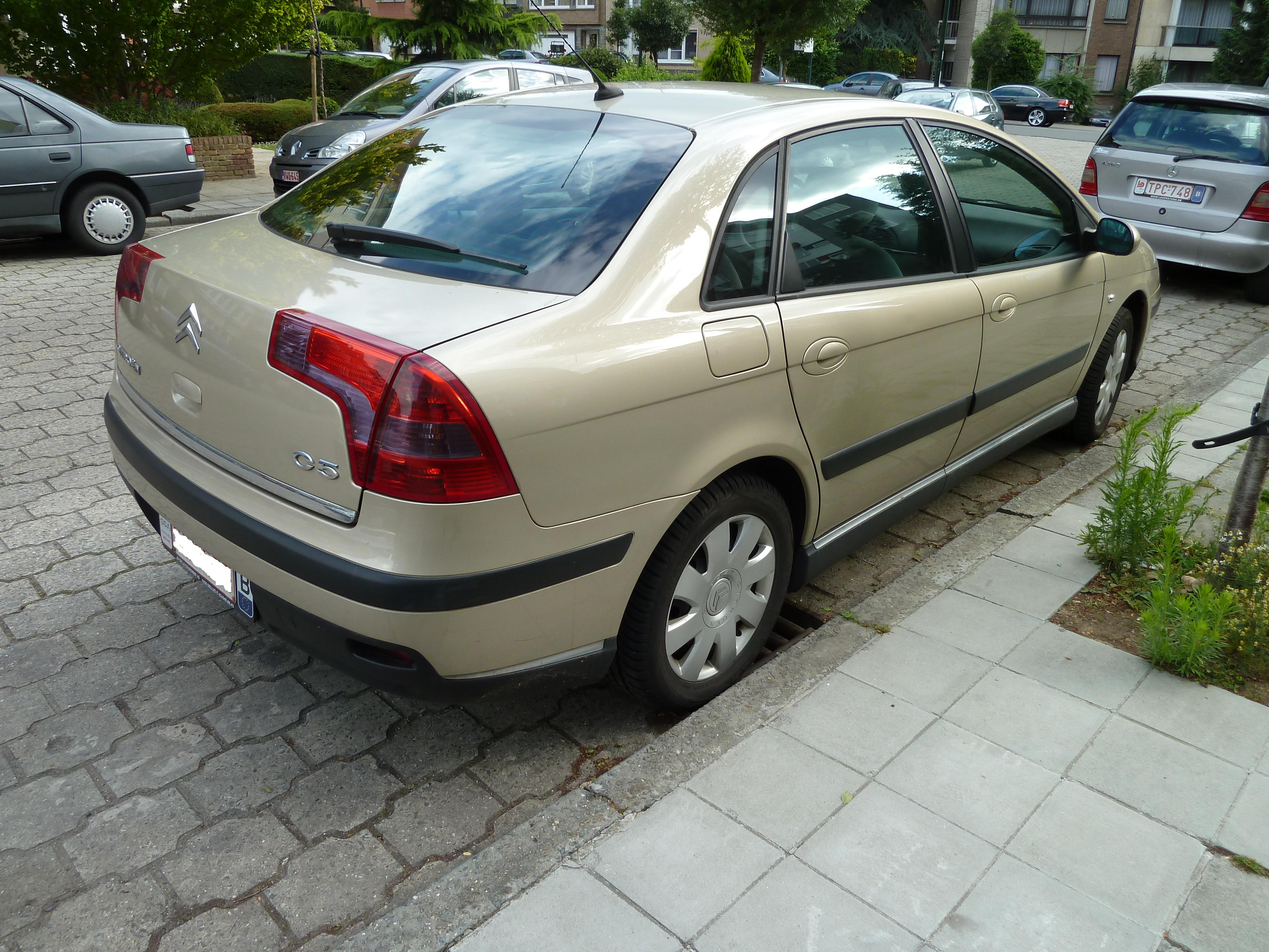 C5 Mk1 Phase II